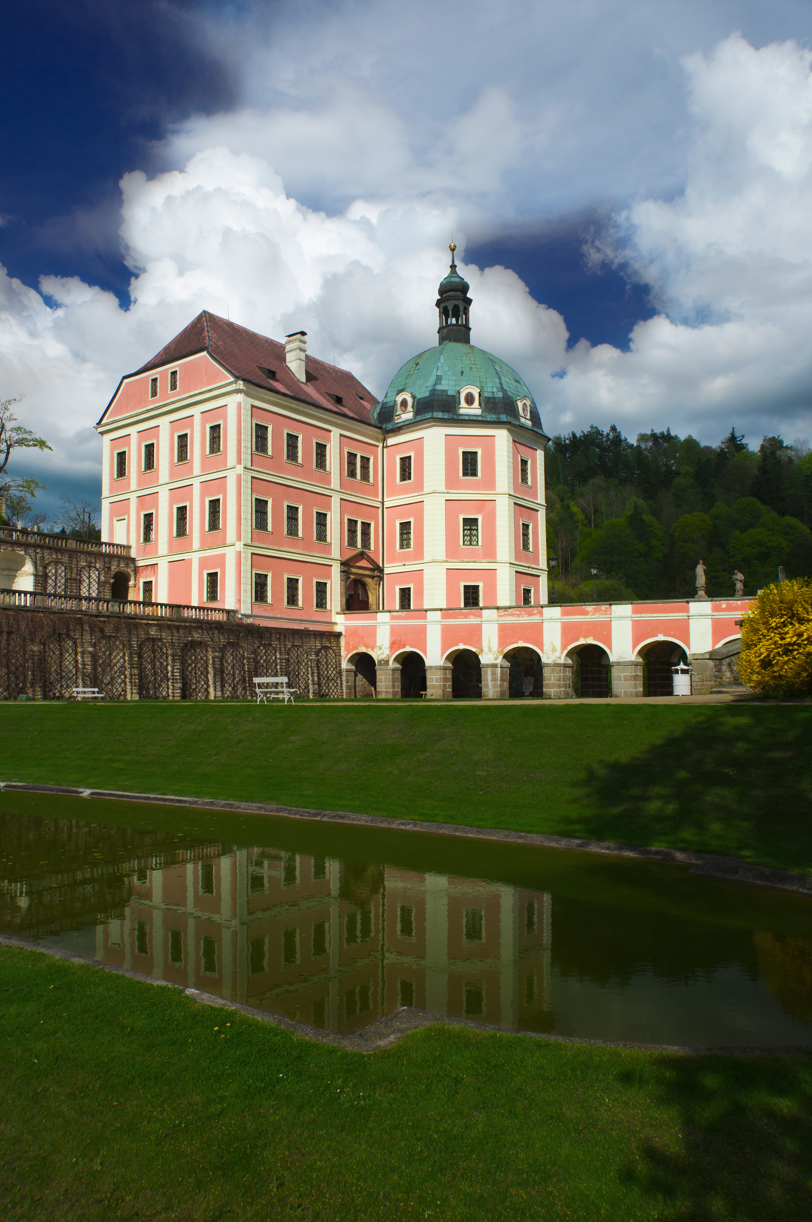 Hrad a zámek Bečov nad Teplou, Bečov nad Teplou 9